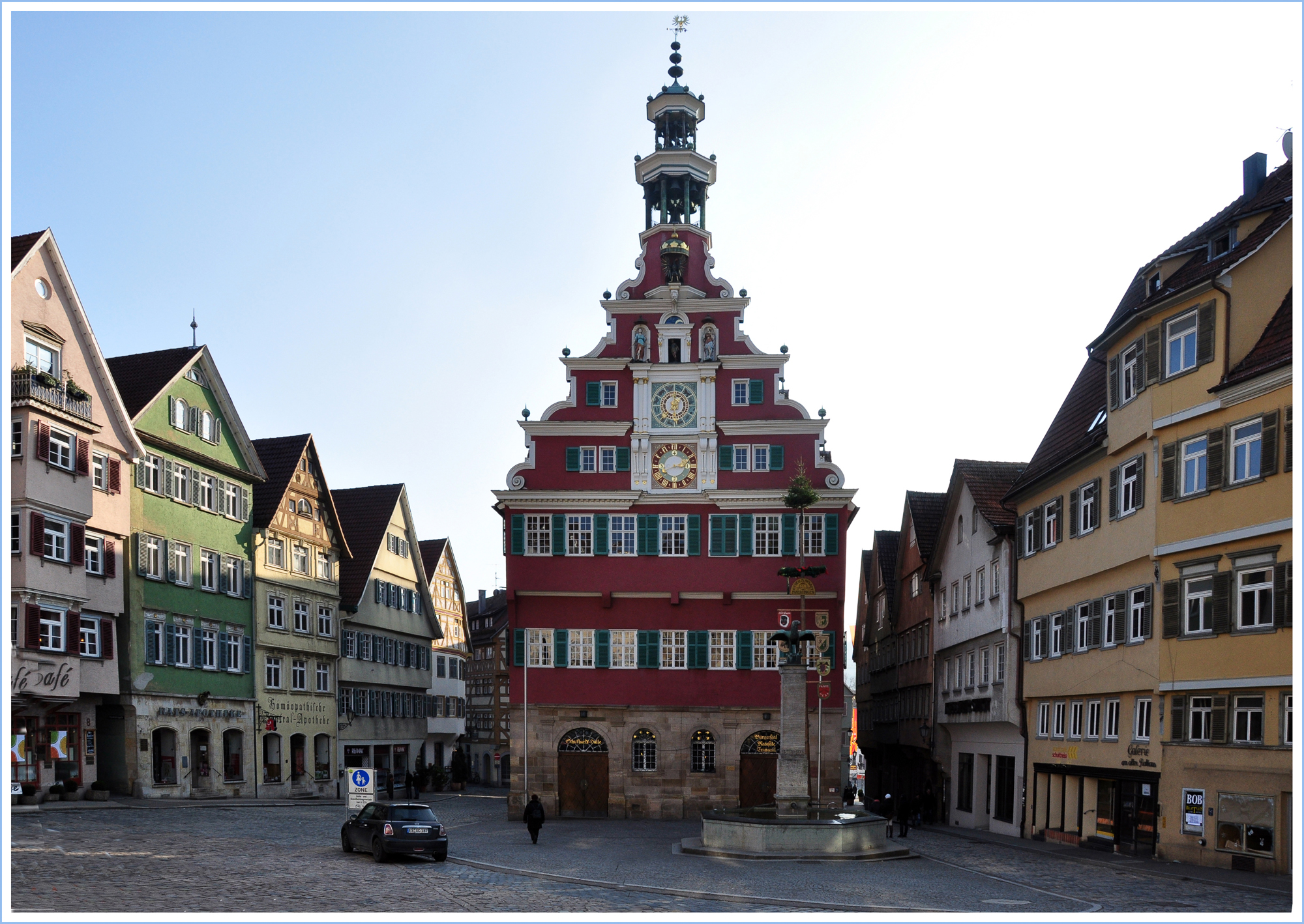 Kulturdenkmal §2 und Sachgesamtheit; Städtebauliche Situation und Nordfassade des Rathauses.